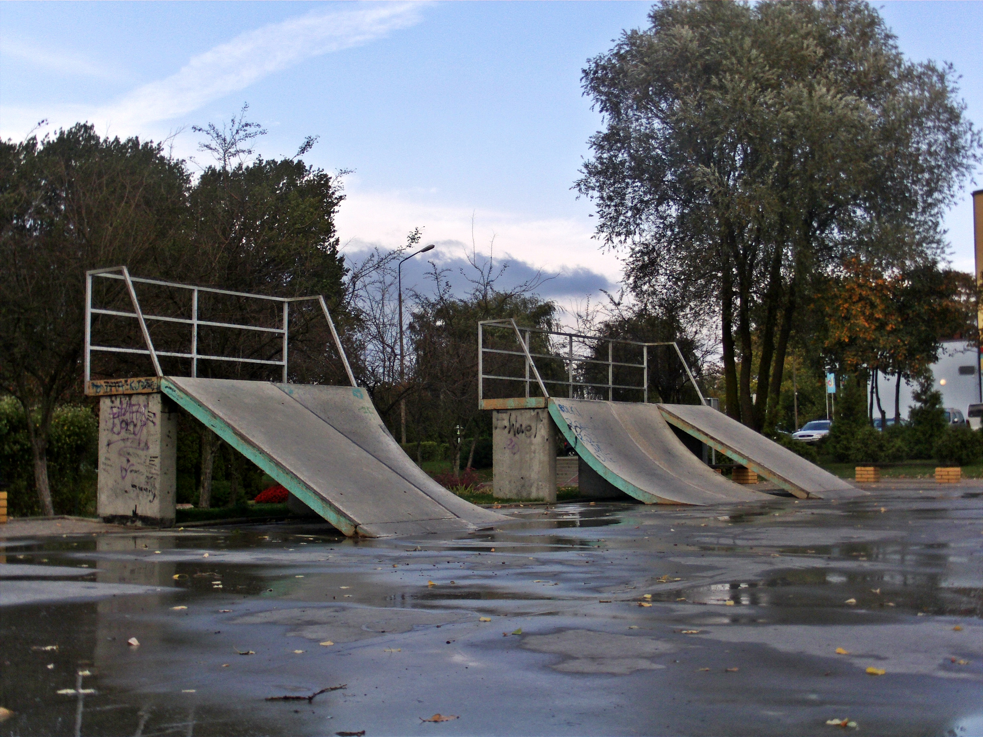 Mały skatepark w Suwałkach nieopodal Zalewu Arkadia. Zdjęcia z 2011 roku. DCIM\100MEDIA